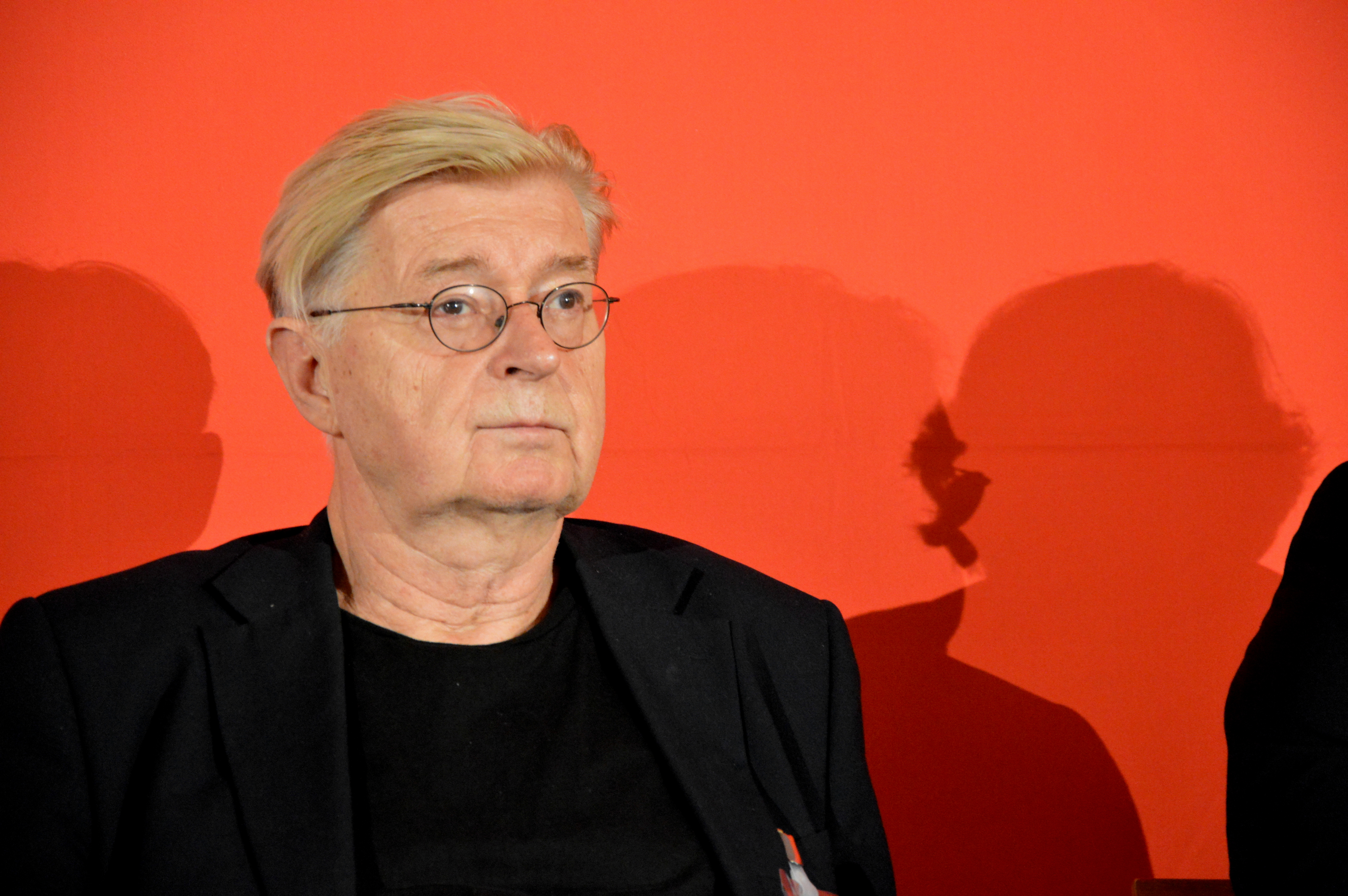 Politikwissenschaftler Thomas Meyer auf dem Kongress „Mehr Gerechtigkeit wagen“ der SPD Schleswig-Holstein in Kiel